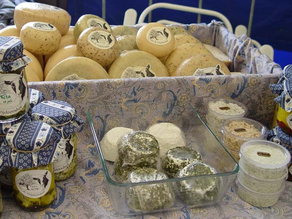 Geitenkaas Geitenkaas